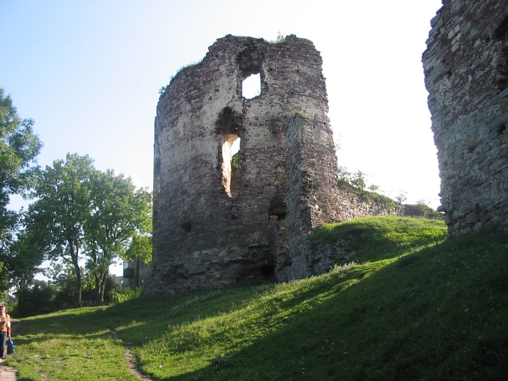 Castle ruins in Buchach, Ukraine